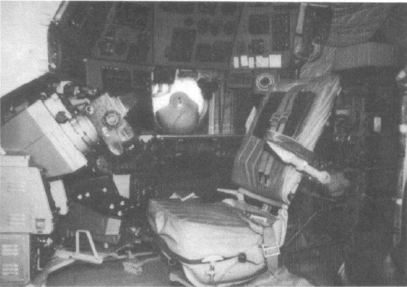 Pomieszczenie nawigatora Mi-14PŁ - wnętrze w kolorze błękitno-szarym, korpus stacji J-2ME - czarny, fotel szary (ma możliwość ruchu wzdłuż sałego pomieszczenia). (opis oryginalny)